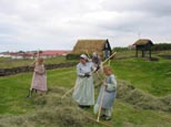 Scene in Arbær Museum. Public Domain